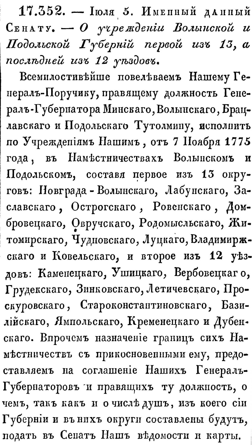 Указ №17352 из Полного собрания законов Российской империи.